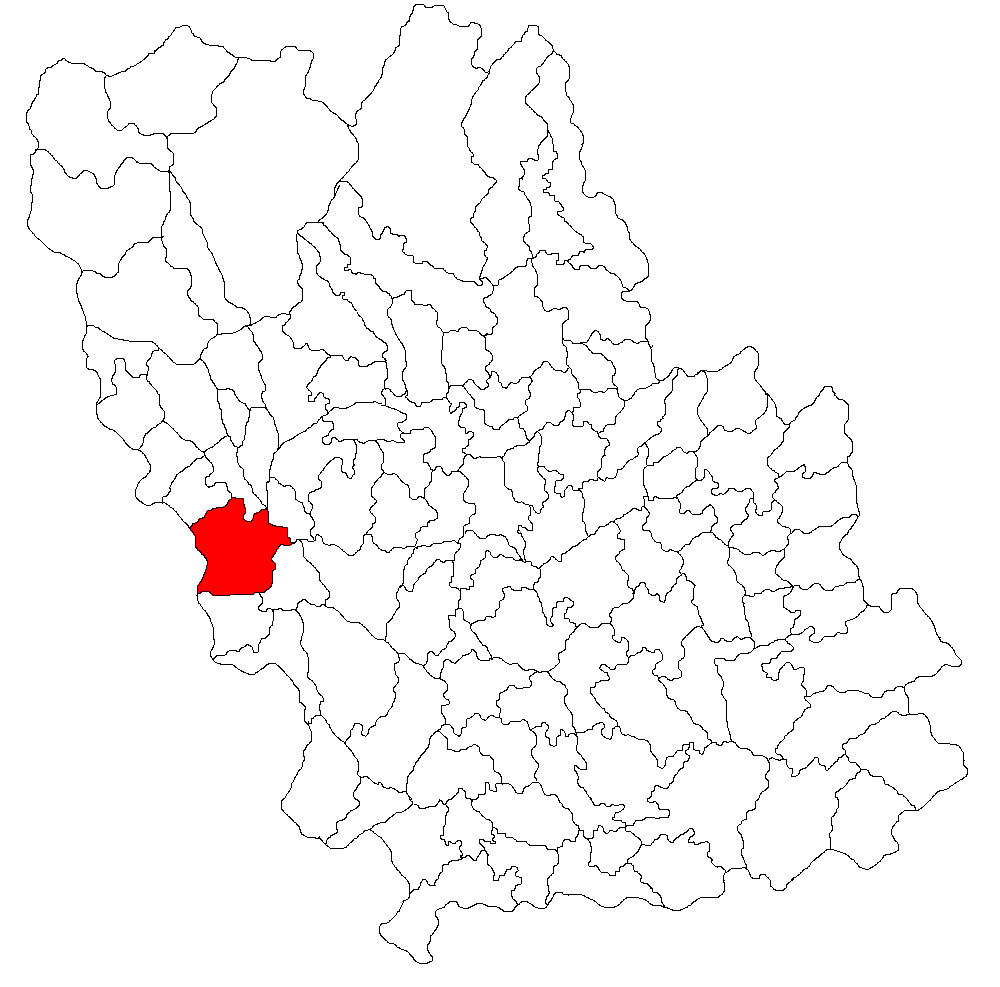 Categorie:Hărţi ale judeţului Prahova